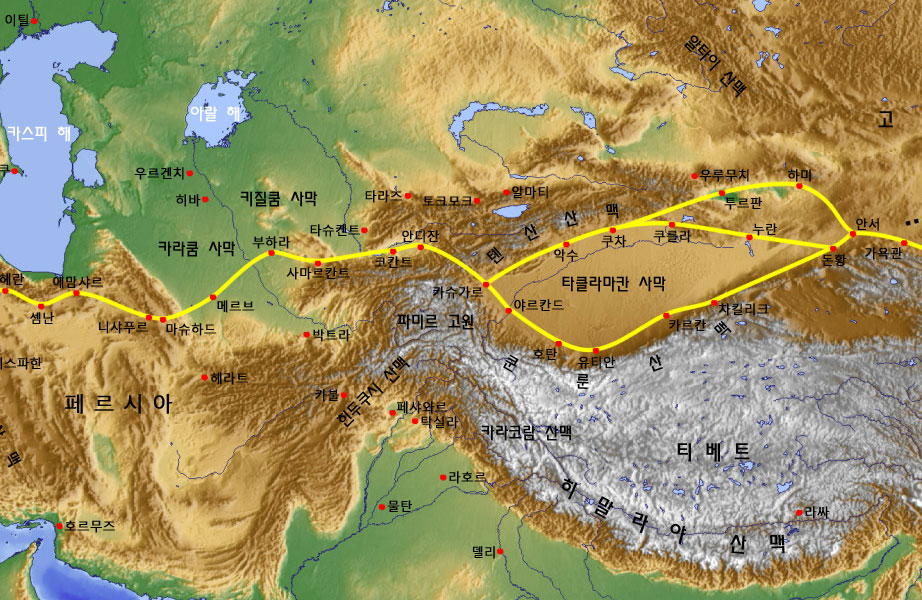 Taklamakan Desert(타클라마칸 사막)